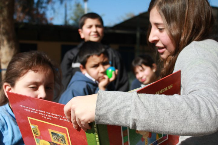 Jornada Recrea 2011